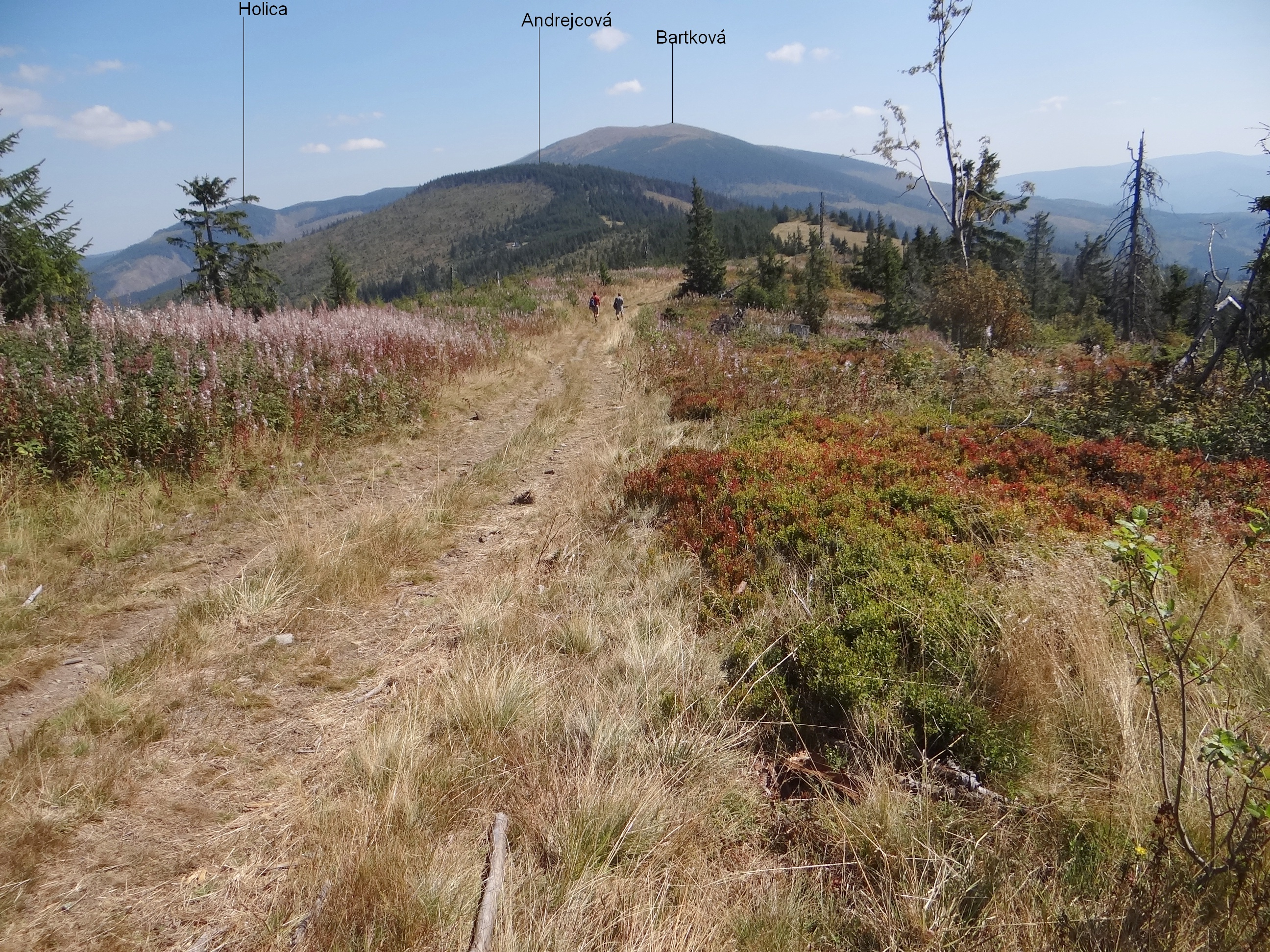 Widok od zachodniej strony na grań ze szczytem Andrejcová i Bartková